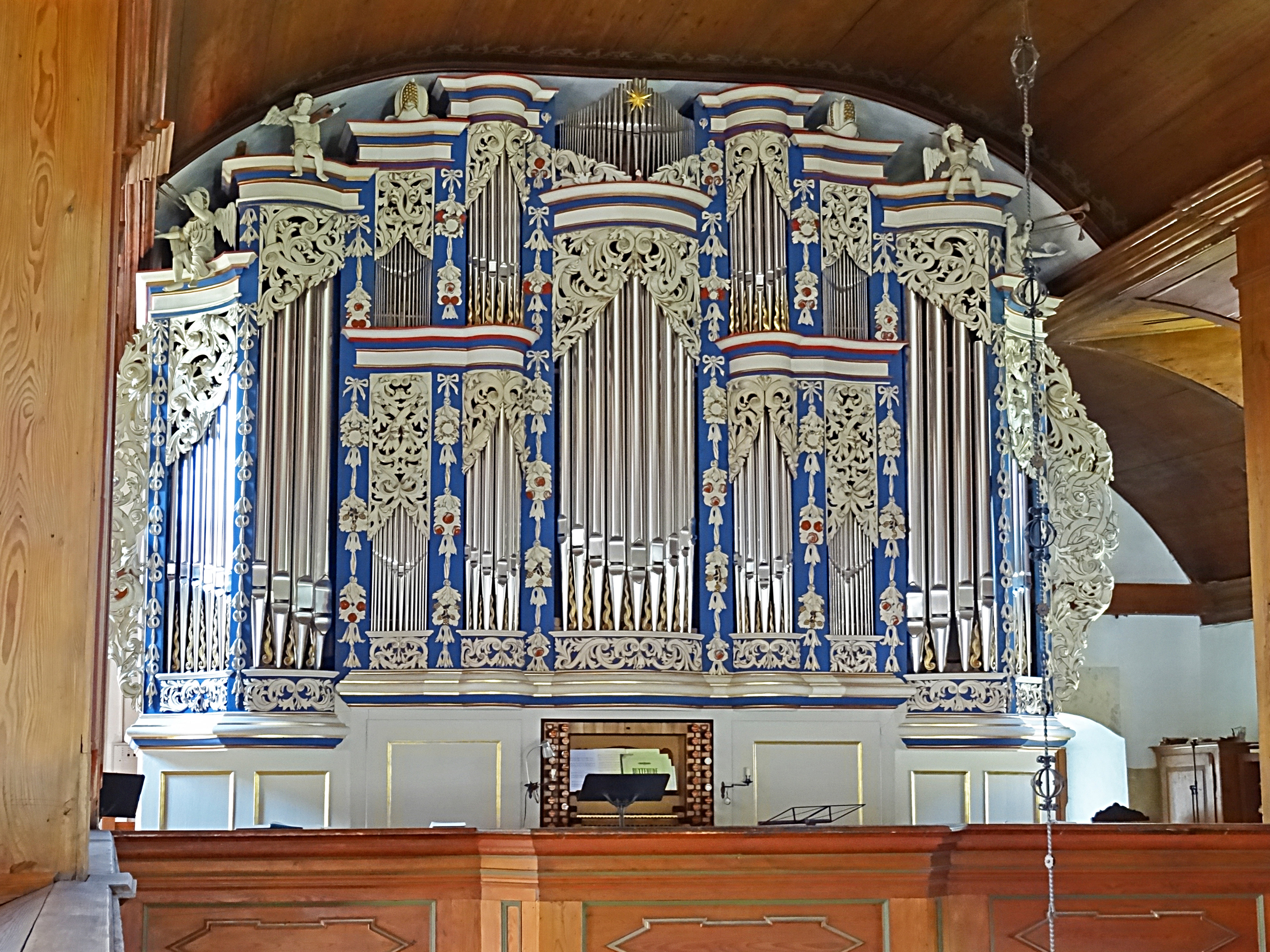 Johann Anton Weise schuf im Jahre 1736 die Orgel in St. Laurentius Gräfenroda für den damaligen Organisten Johann Peter Kellner. Um 1909 wurde von Adam Eifert die Pneumatik geändert. 1970 führte Hartmut Schüßler eine Restaurierung durch. 2005 Rekonstruktion der ursprünglichen Arbeit durch Orgelbau Waltershausen. Für das geübte Auge wurde oben unter dem Stern ein netter Hinweis auf die Heimatstadt der Gartenzwerge Gräfenroda hinterlassen.